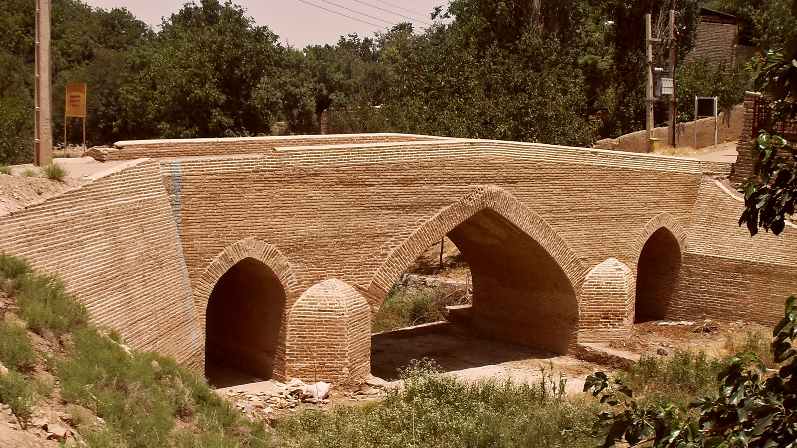 پل طینوج که در گذشته محل عبور کاروان‌ها به سوی عتبات بوده‌است و نیز در مسیر شهر همدان قرار داشته‌است.